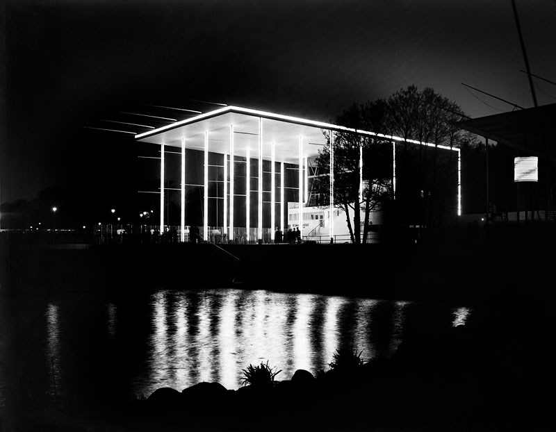 Utställningskommissariatet på Stockholmsutställningen i nattbelysning. Utställningen pågick maj- september 1930